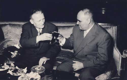 Vizita delegatiei din RSF Cehoslovaca. Dej il intampina pe presedintele Antonin Novotny. Vizita delegatiei din RSF Cehoslovaca. Dej si Antonin Novotny.